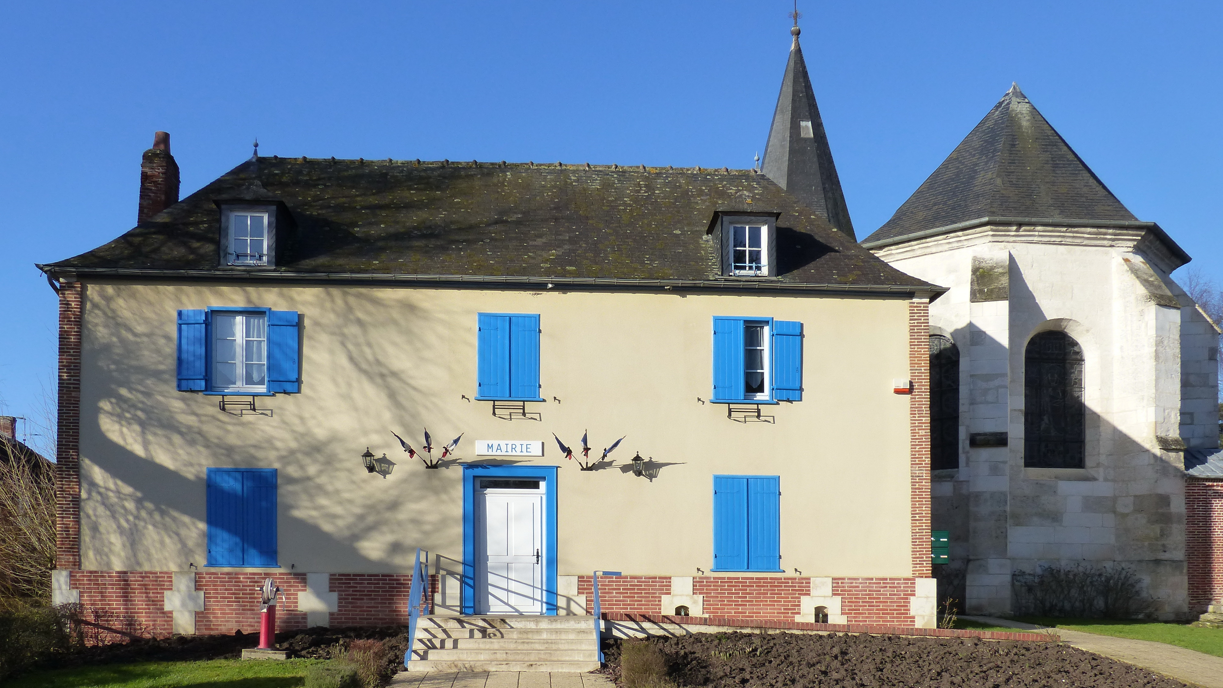 La mairie et le chœur de l'église Saint-Eloi d'Auchy-la-Montagne